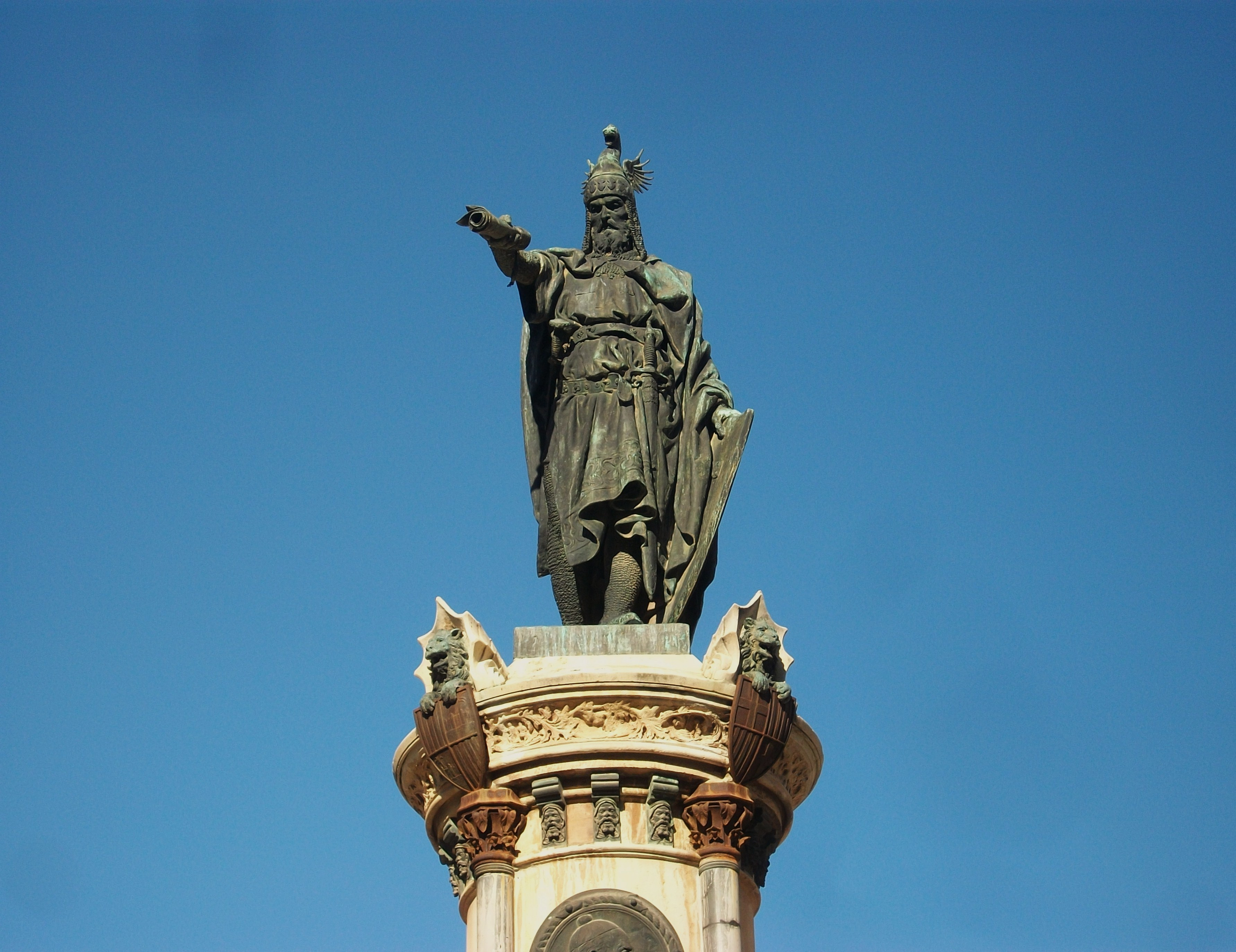 Estàtua de Jaume I a Castelló de la Plana, País Valencià.